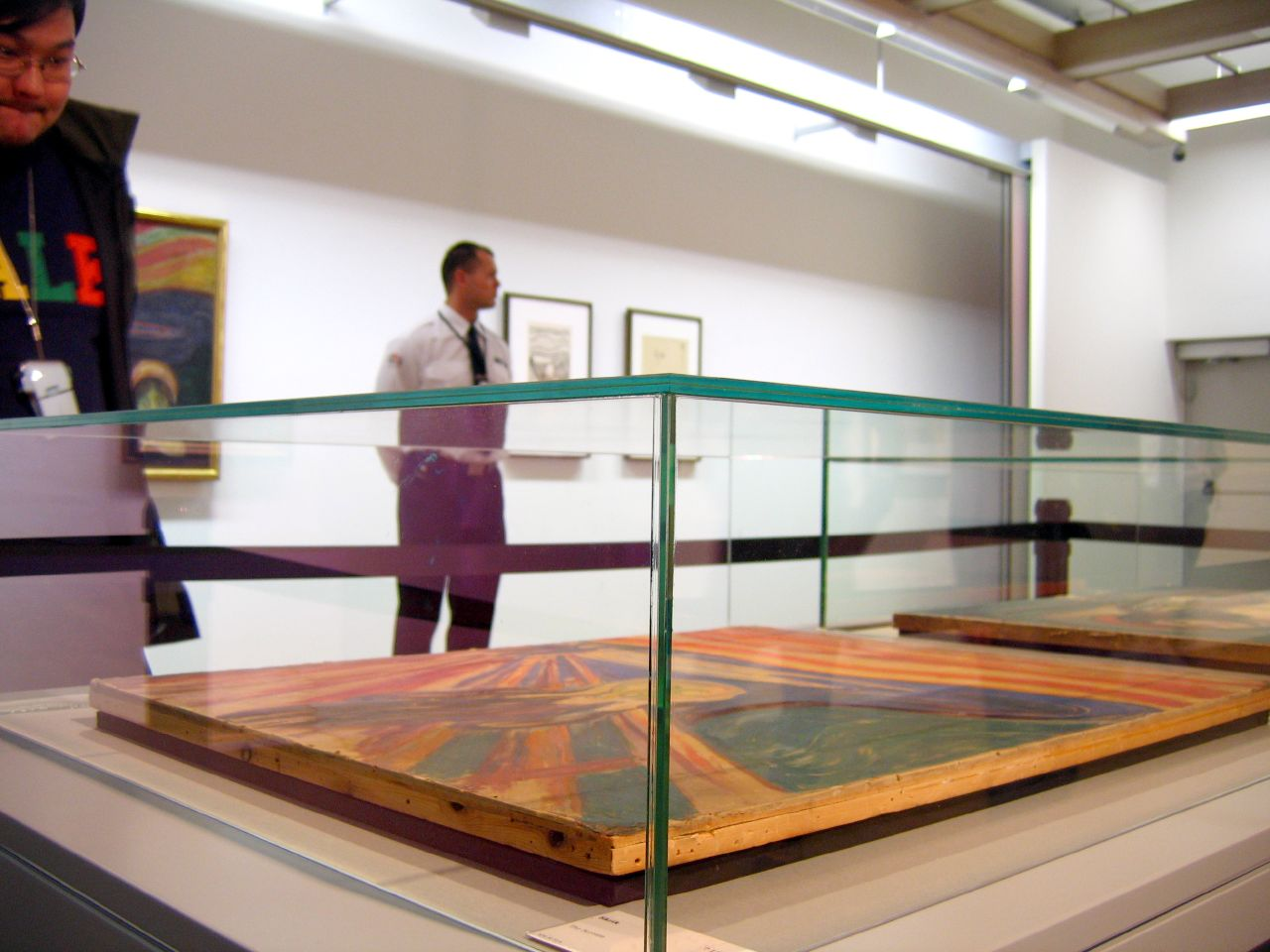 Strenge Sicherheitsmaßnahmen zur Bewachung von Edvard Munchs „Schrei“